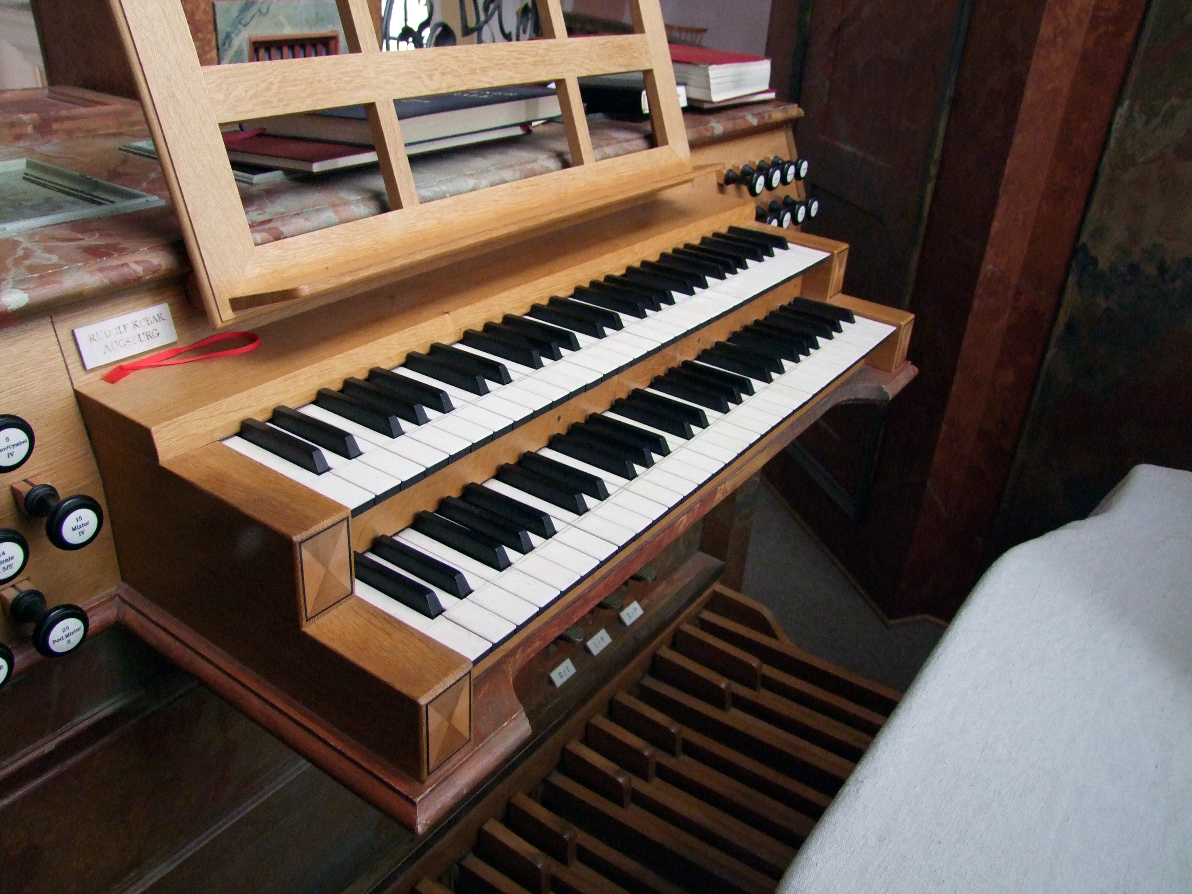 Mariä Verkündigung im oberschwäbischen Mindelheim. Ehemalige Augustiner, dann Jesuitenklosterkirche.